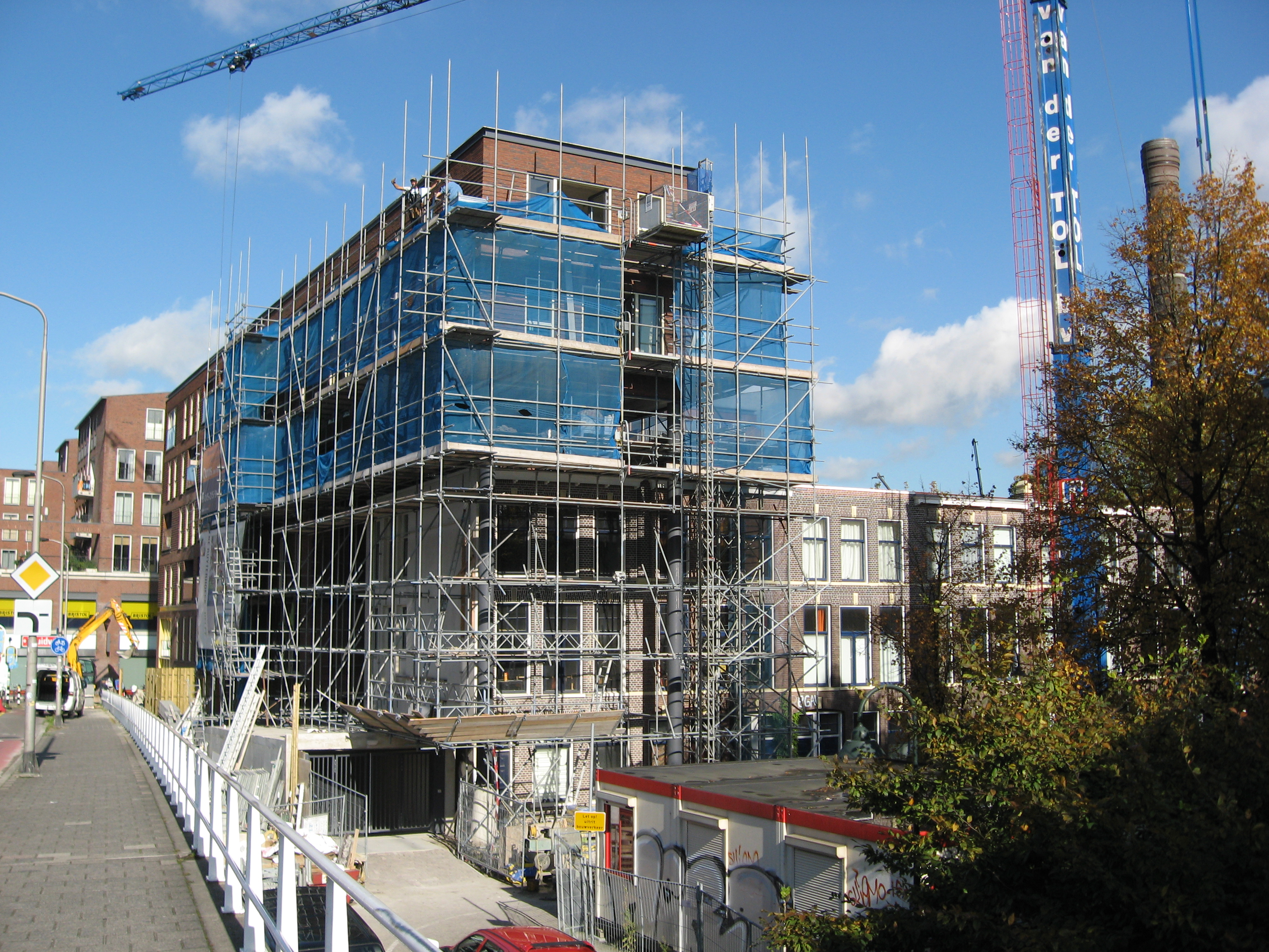 Appartementencomplex de Ruyterhoeck wordt over de professorenwoningen gebouwd